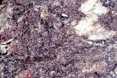 Acarospora fuscata